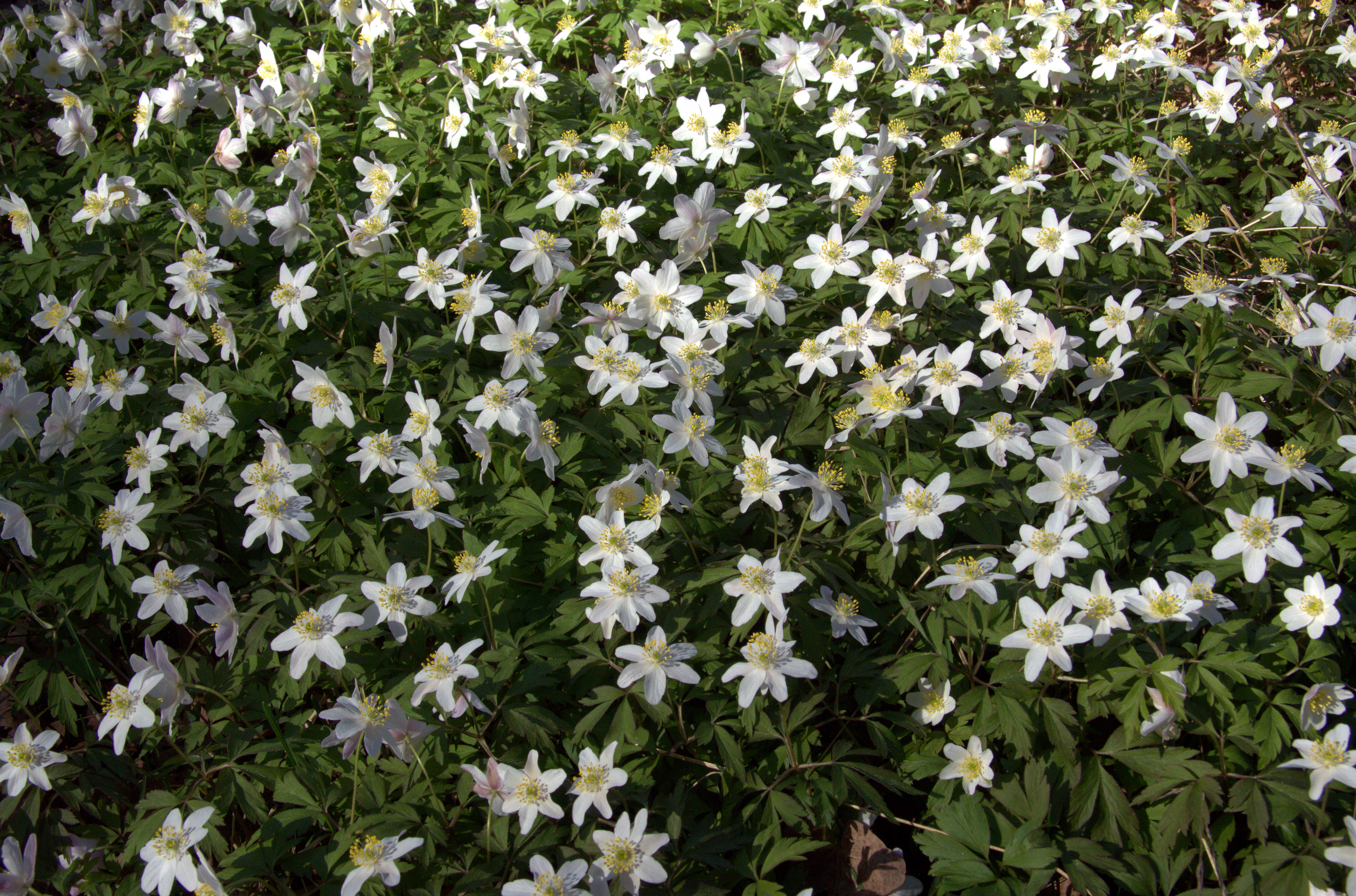 Anemone nemorosa